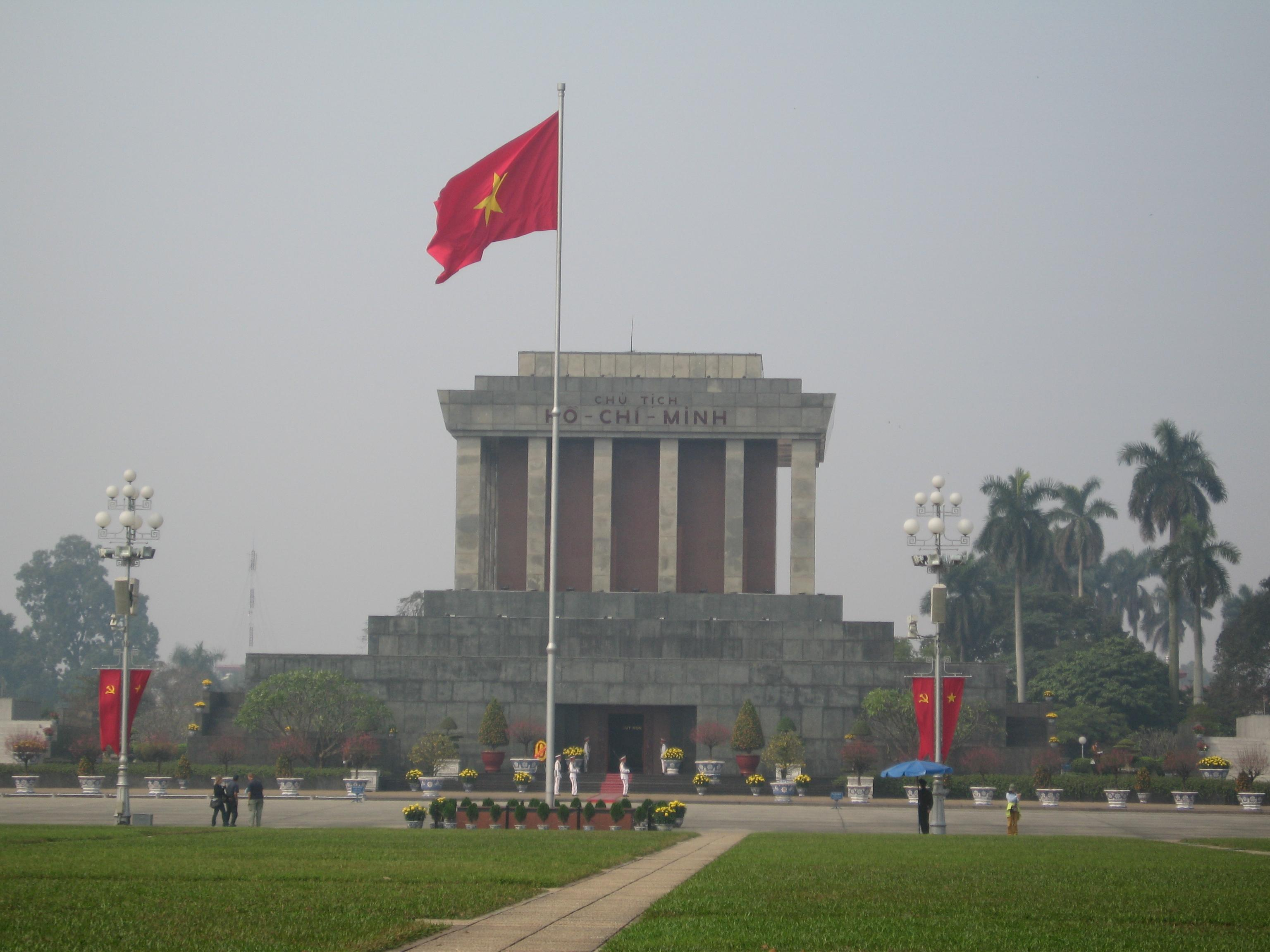 Lăng Hồ Chí Minh. Ảnh này do người truyền lên chụp.